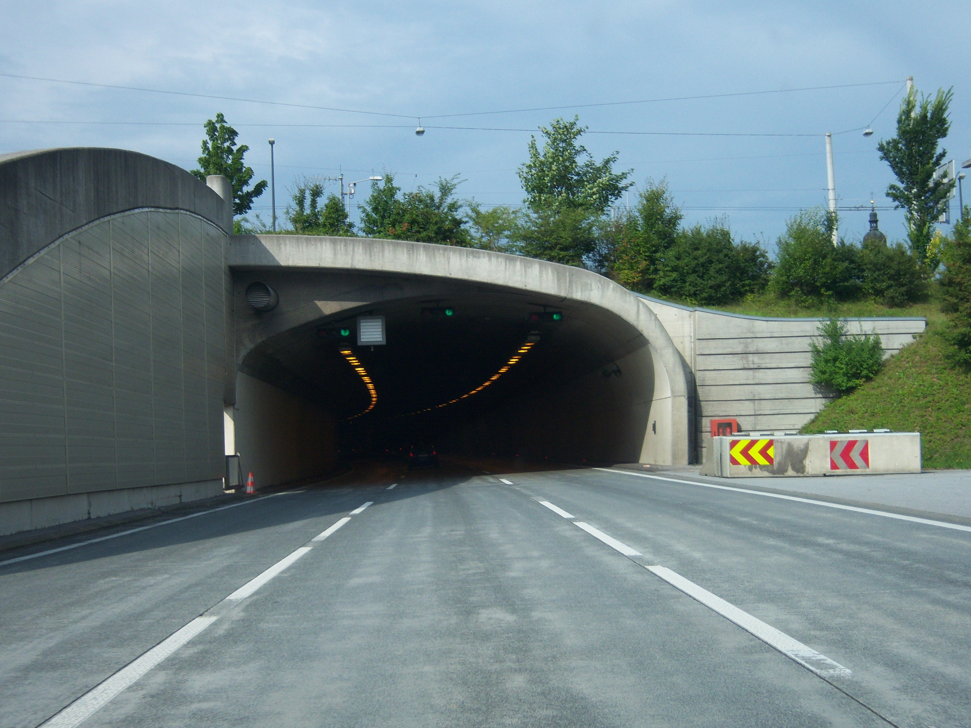 West Autobahn A1 Richtung Salzburg im Bereich des Tunnel Liefering